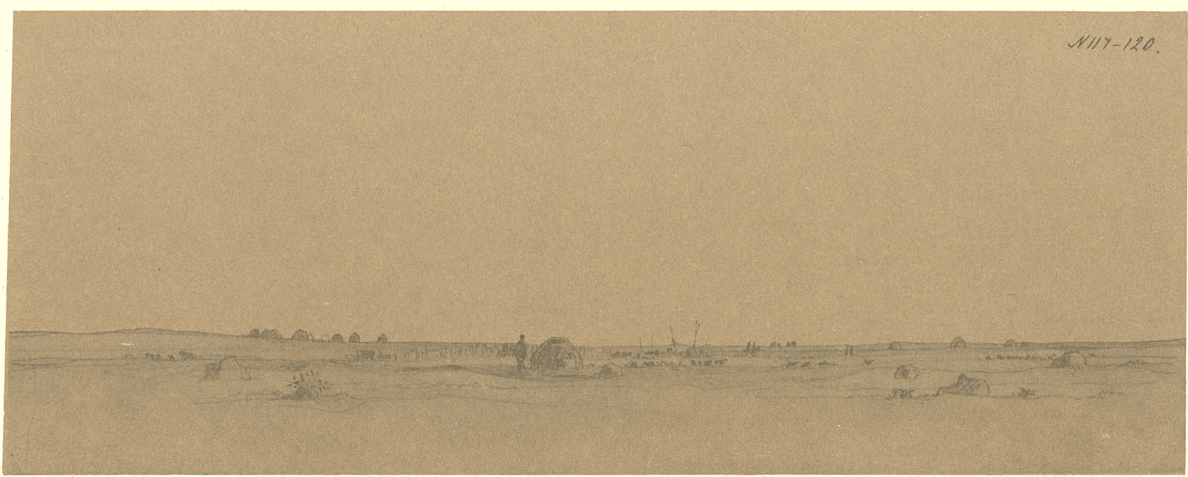 Казахське кочовище. Тонований папір, олівець (11,3 × 28,3). [Новопетровське укріплення]. [1856].